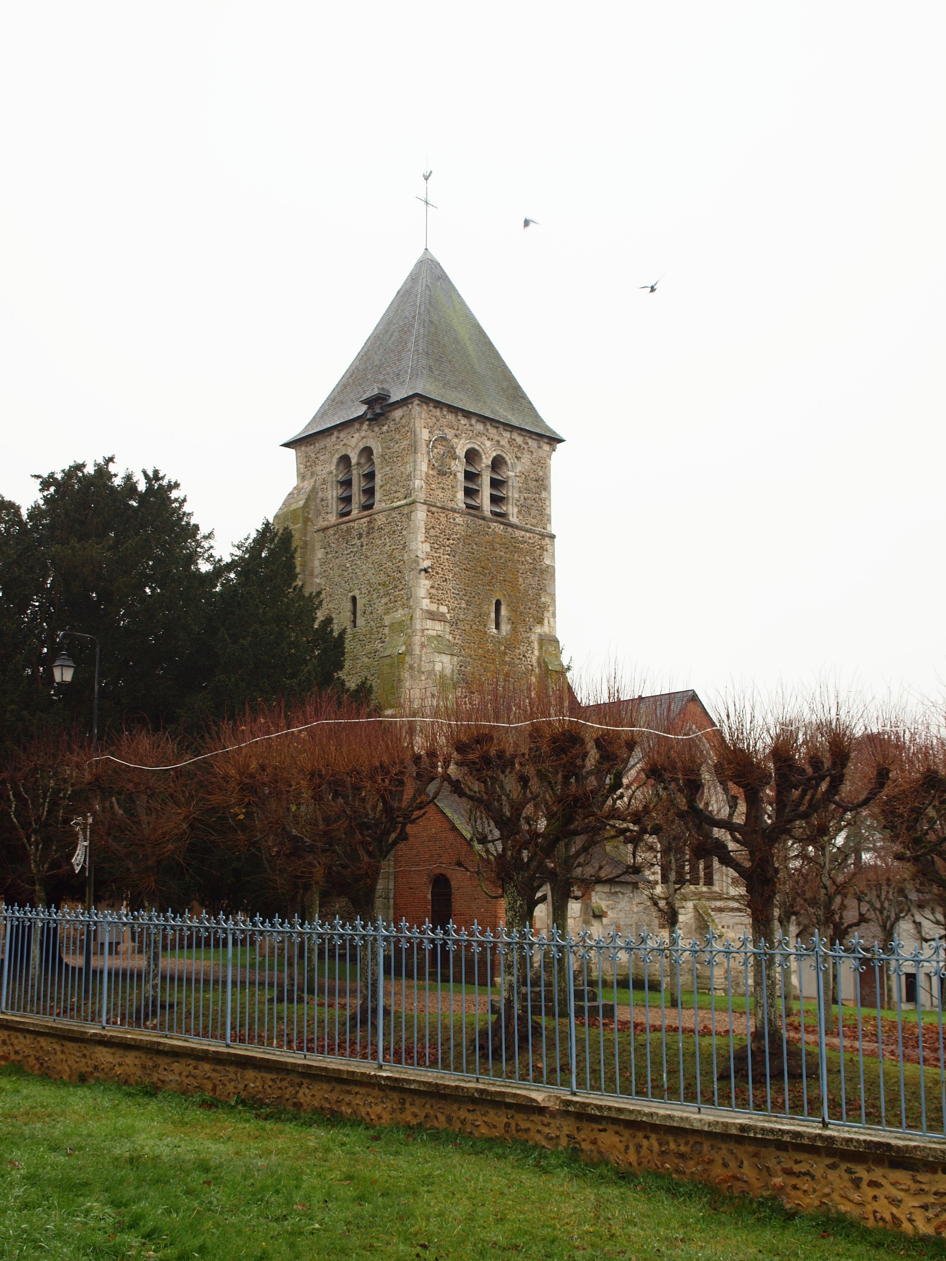 Église Saint-Médard d'Ailly (Eure, France)